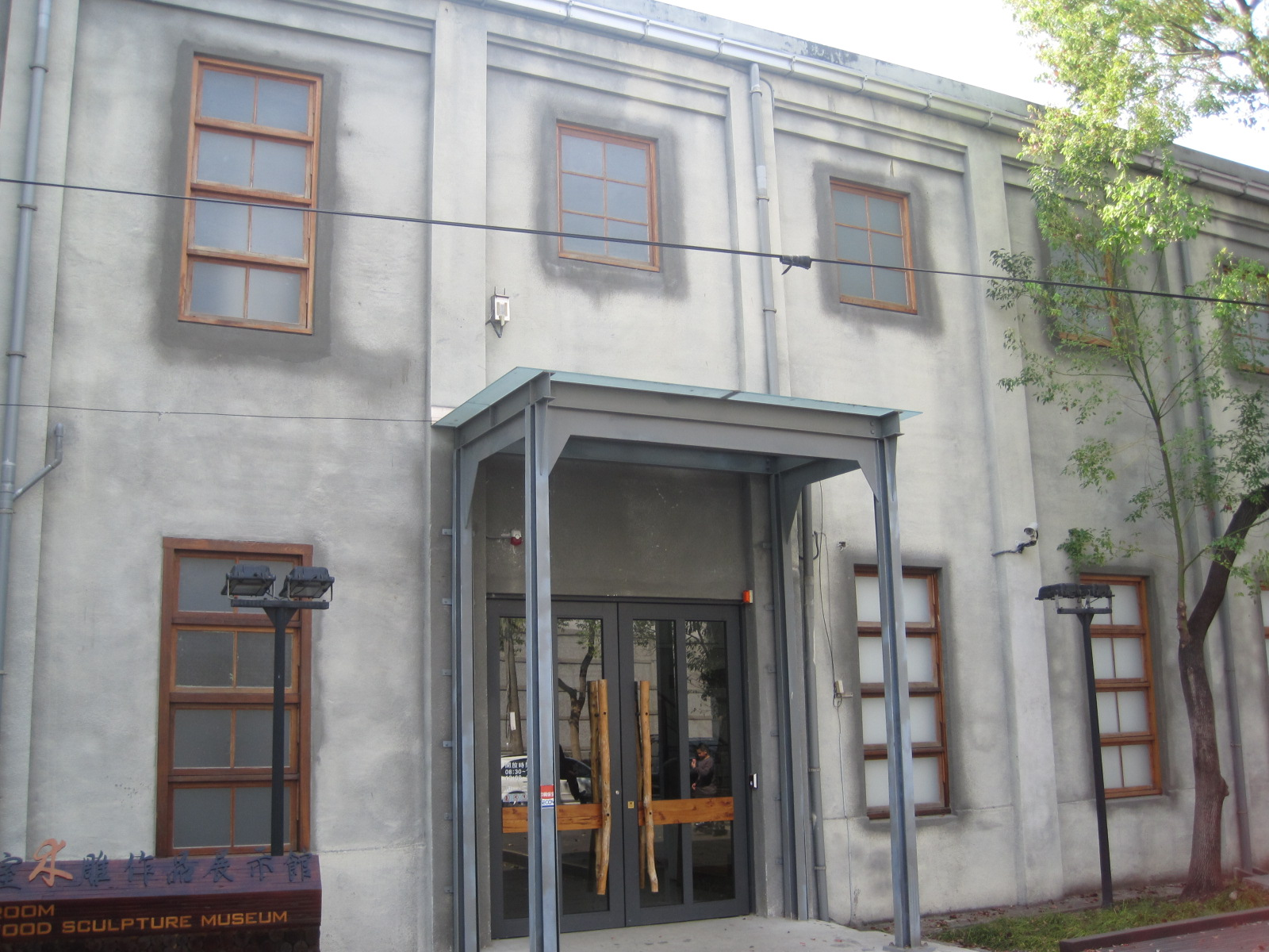 中文（台灣）: 原嘉義製材所動力室。